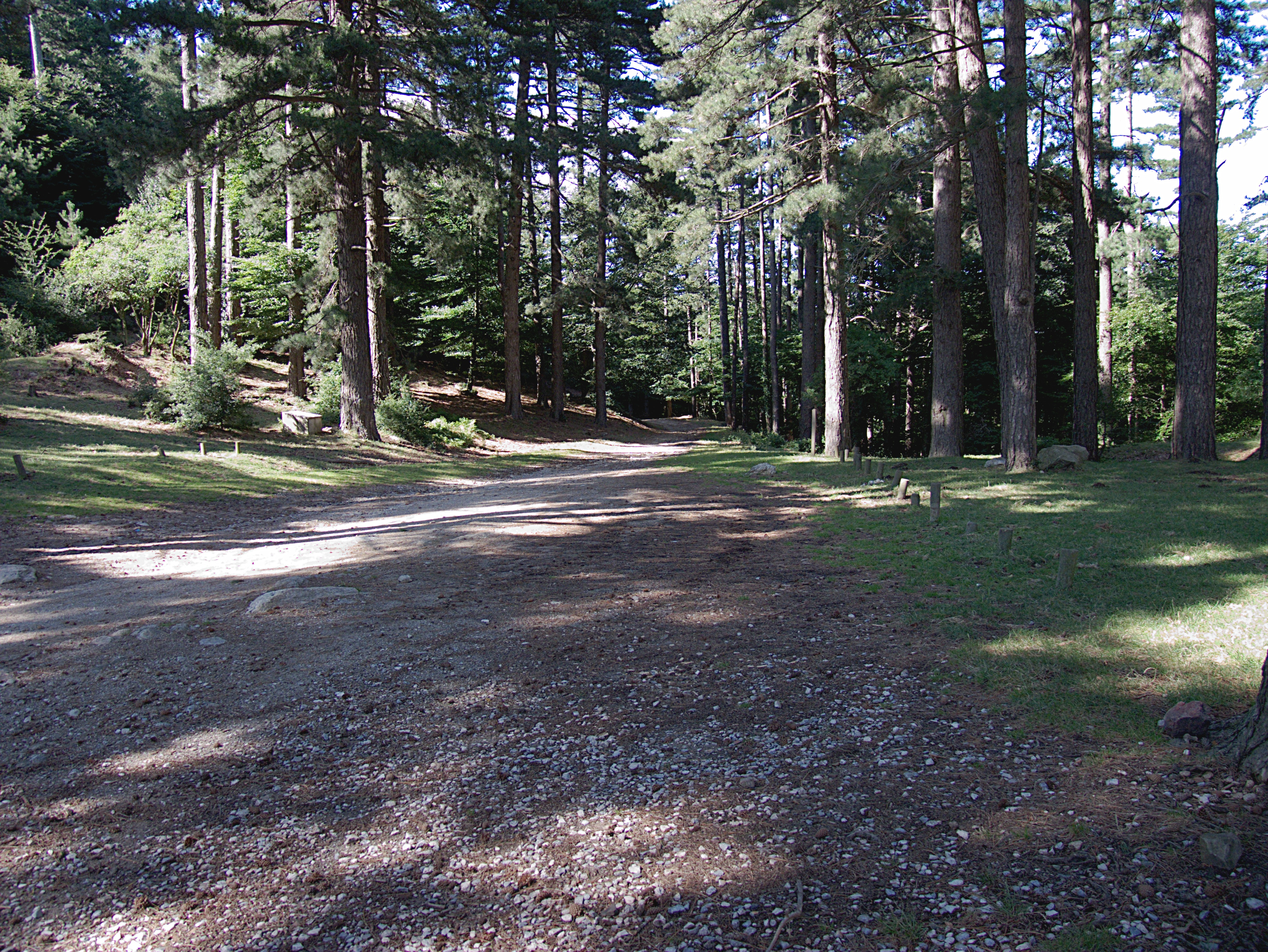 Sentier en direction de Laroque-des-Albère, Col de l'Ullat, Montesquieu des Albères (Pyrénées-Orientales, Languedoc-Roussillon, France), Laroque-des-Albères (Pyrénées-Orientales, Languedoc-Roussillon, France)